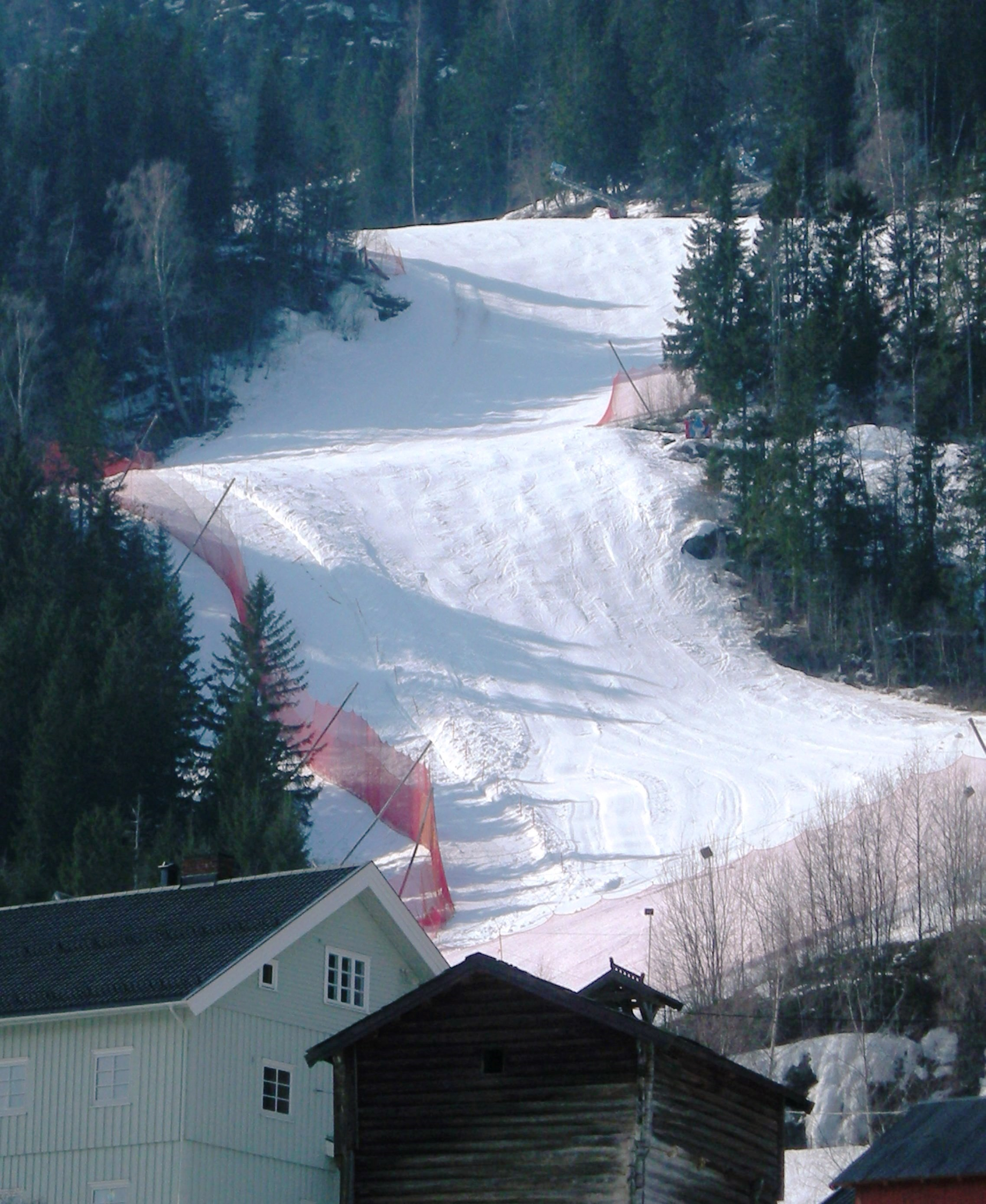 Alpinbakken på Kvitfjell går ned fjellsiden over Mælum gård.